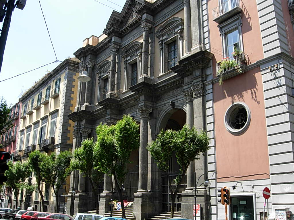 Chiesa di San_Giovanni_Battista_delle_Monache in Napoli Foto personale concessa in PD